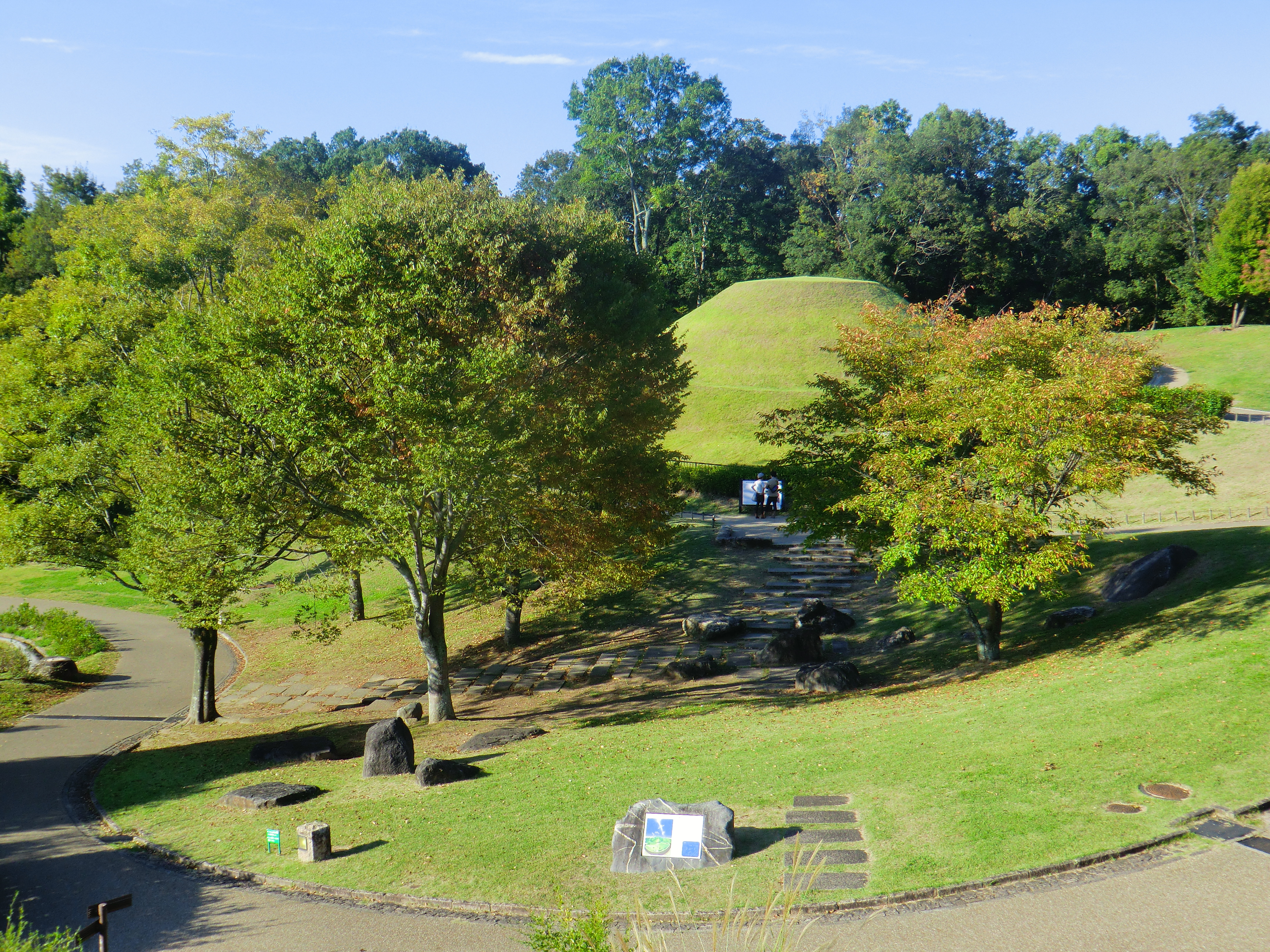 高松塚（国営飛鳥歴史公園・奈良県明日香村）